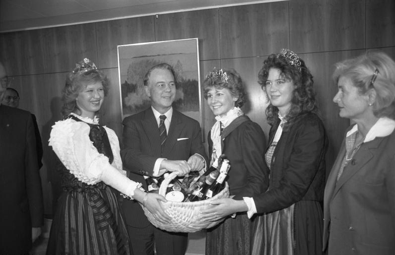 8.11.1985 Der neue Präsident des Bundesrates, Dr. Ernst Albrecht, erhält von der deutschen Weinkönigin Mechthild Meyer (3.v.re.) aus Waldrach (Mosel-Saar-Ruwer) und ihre beiden deutschen Weinprinzessinnen Monika Kram (links) aus Franken und Barbara Laurenstein (rechts) von der Nahe.